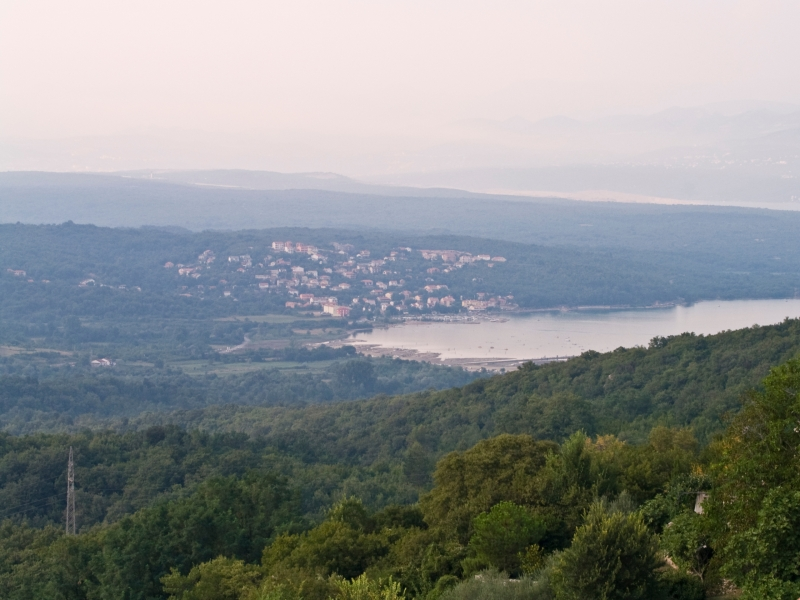 pogled na Čižiće s Dobrinja na otoku Krku